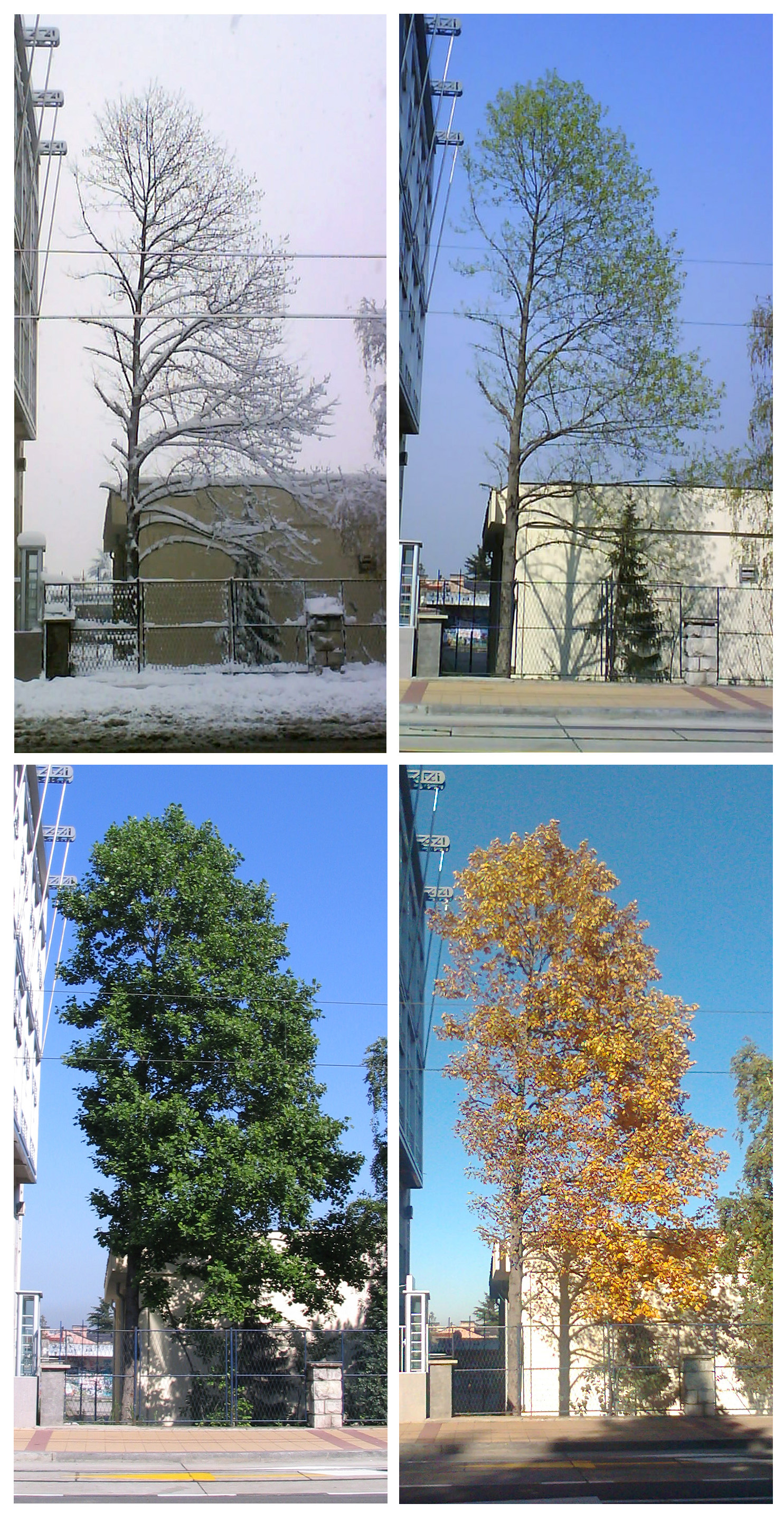 Сезонске промене на лалином дрвету; Пожешка улуца, Београд (Аутор: Михаило Грбић, 2010).